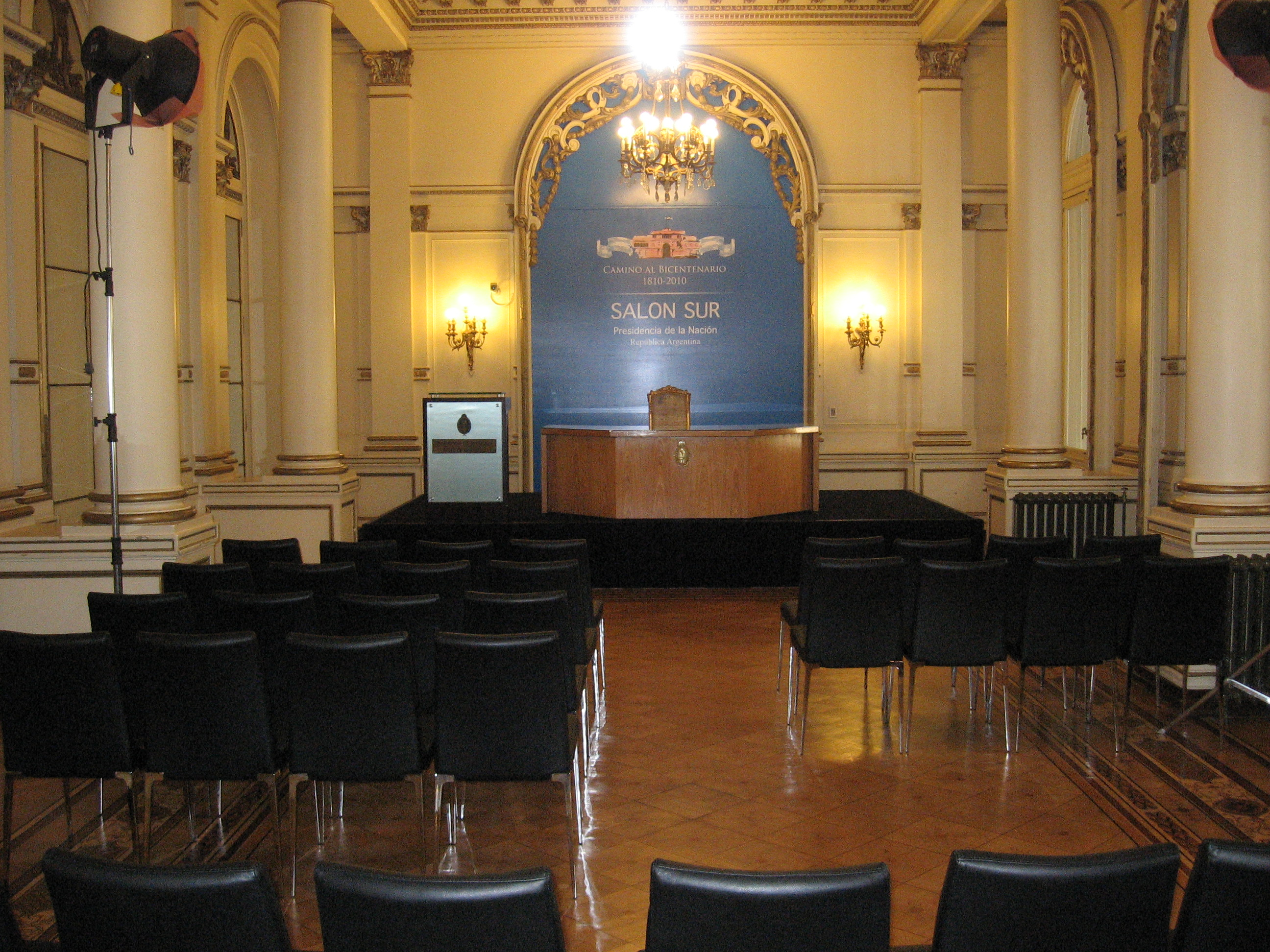 Salón Sur, Casa Rosada